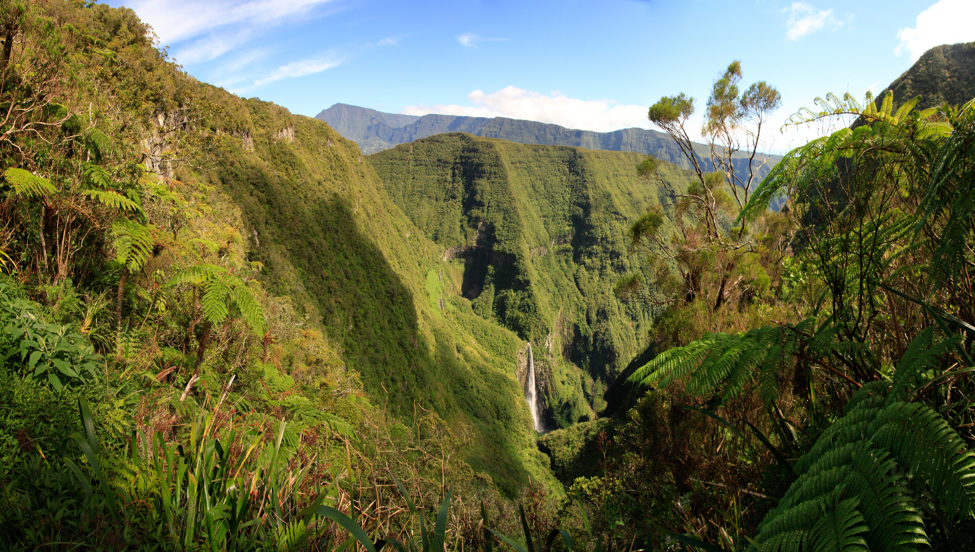 Vue sur la cascade du Trou de Fer, Parc national de la Réunion